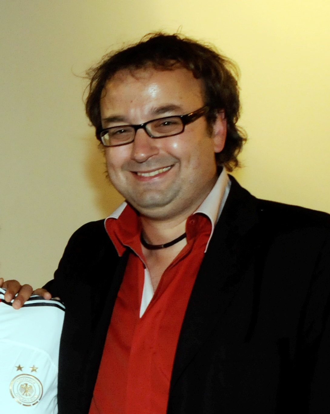 Daniel Meuren (FAZ) Foto: Ruth Plössel